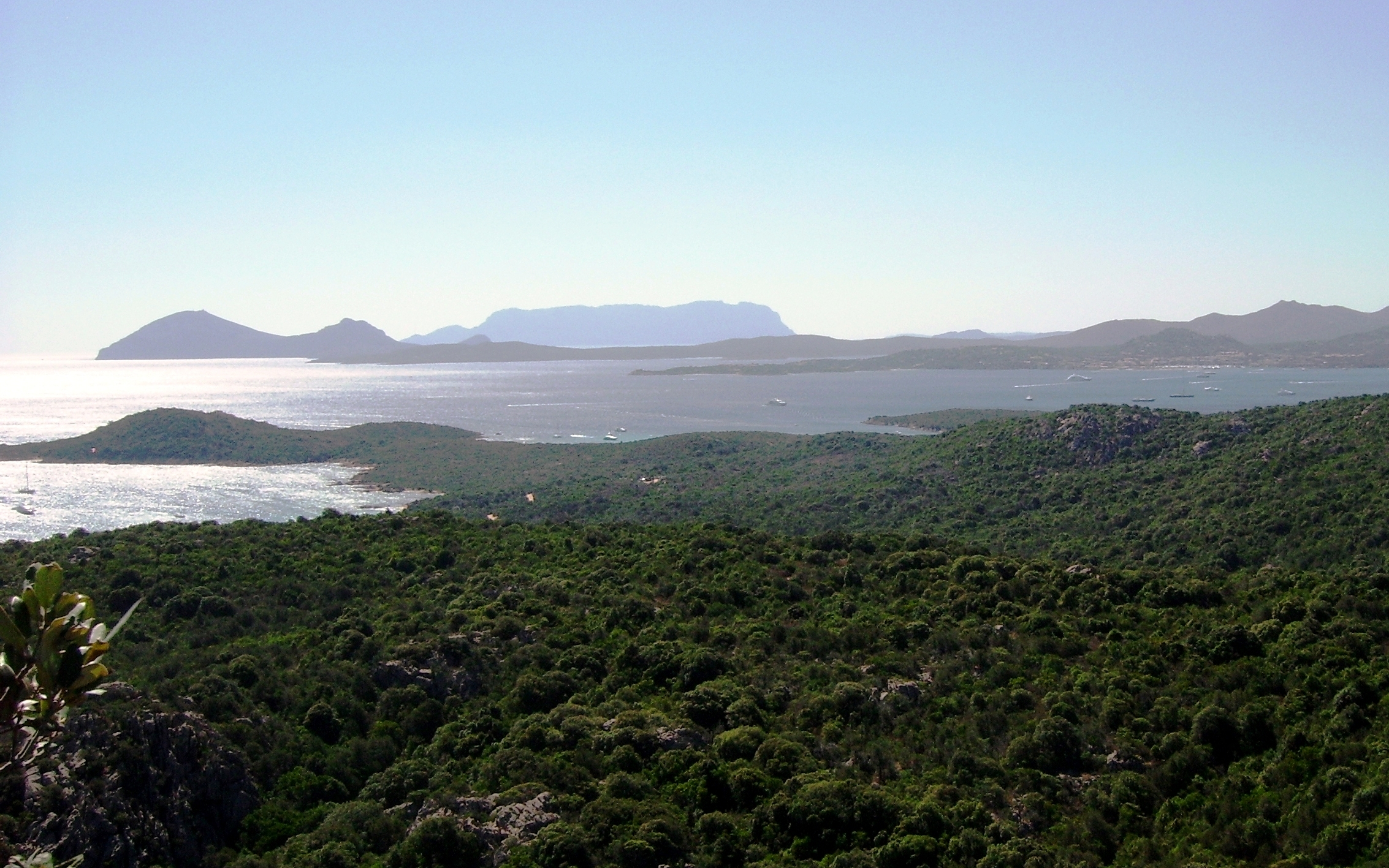 Sardegna - Gallura - Il golfo di Cugnana, sullo sfondo Capo Figari e il profilo di Tavolara Own work By --Shardan 16:41, 14 September 2007 (UTC)